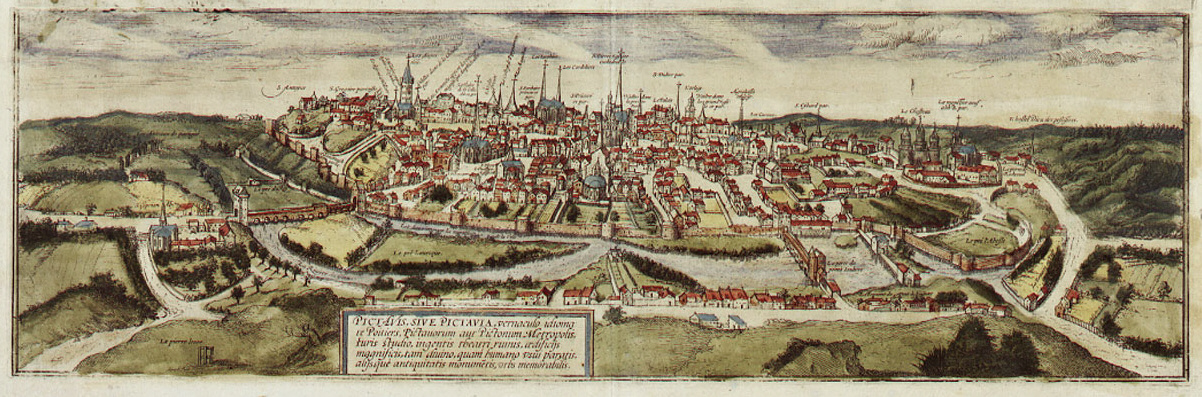 Poitiers